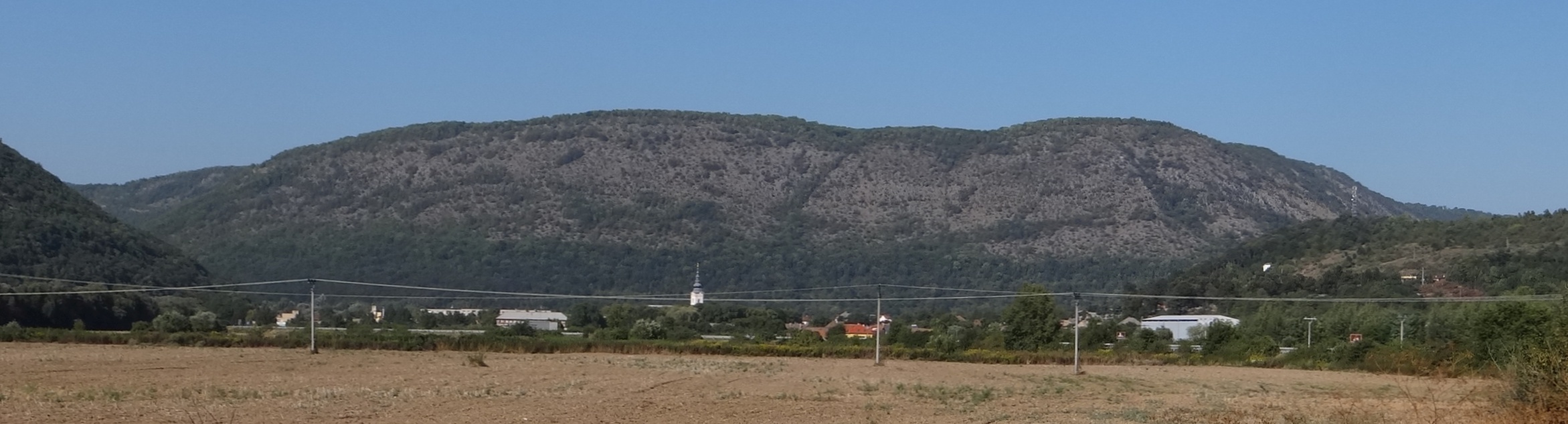 Plešivská planina, Plešivec